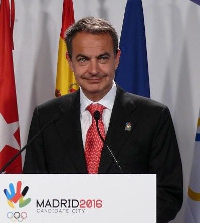 José Luis Rodríguez Zapatero, presidente del gobierno de España (2004 - 2011).